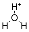 Ione Idronio. Immagine creata da me con Corel Photo Paint il giorno 11 giugno 2006, Napoli.